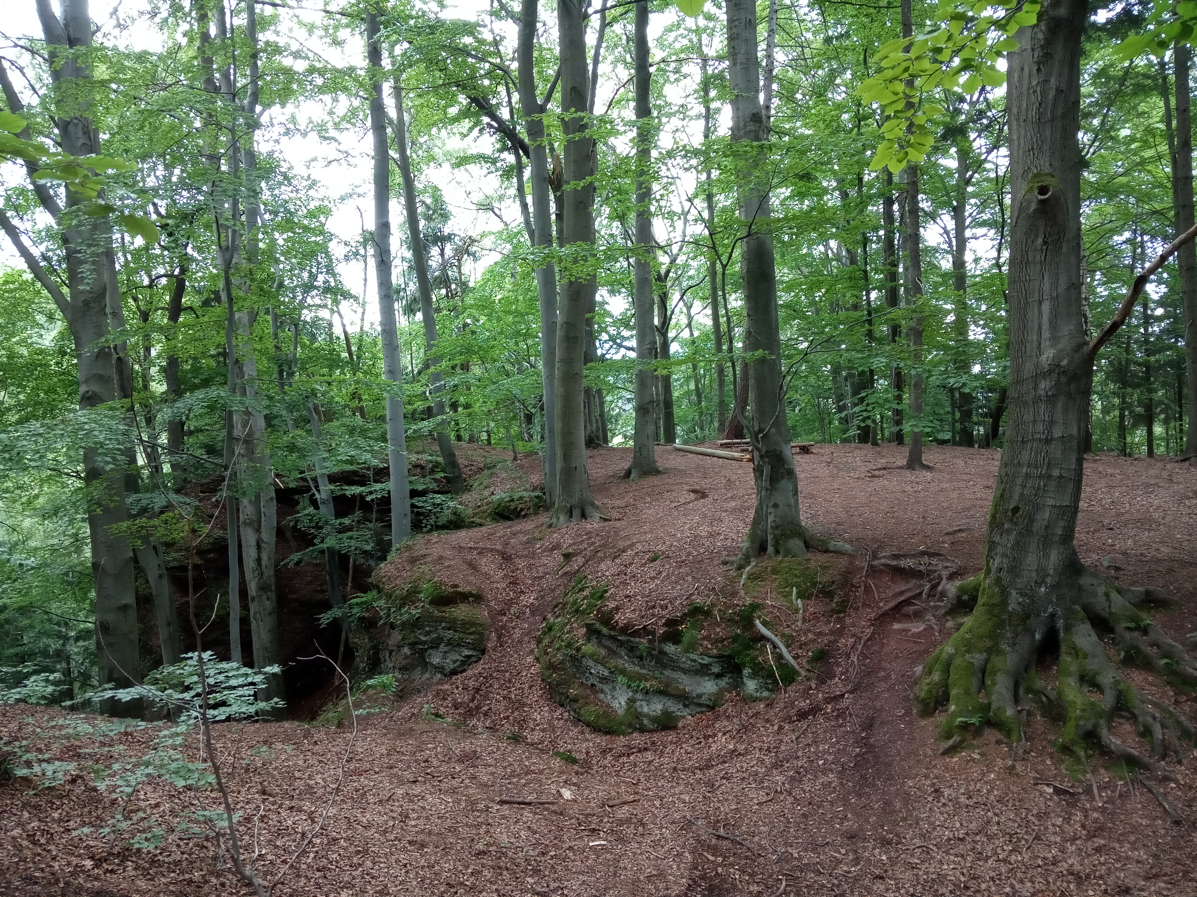 Libeč - skalní ostroh se zbytky hradu Rechenburk